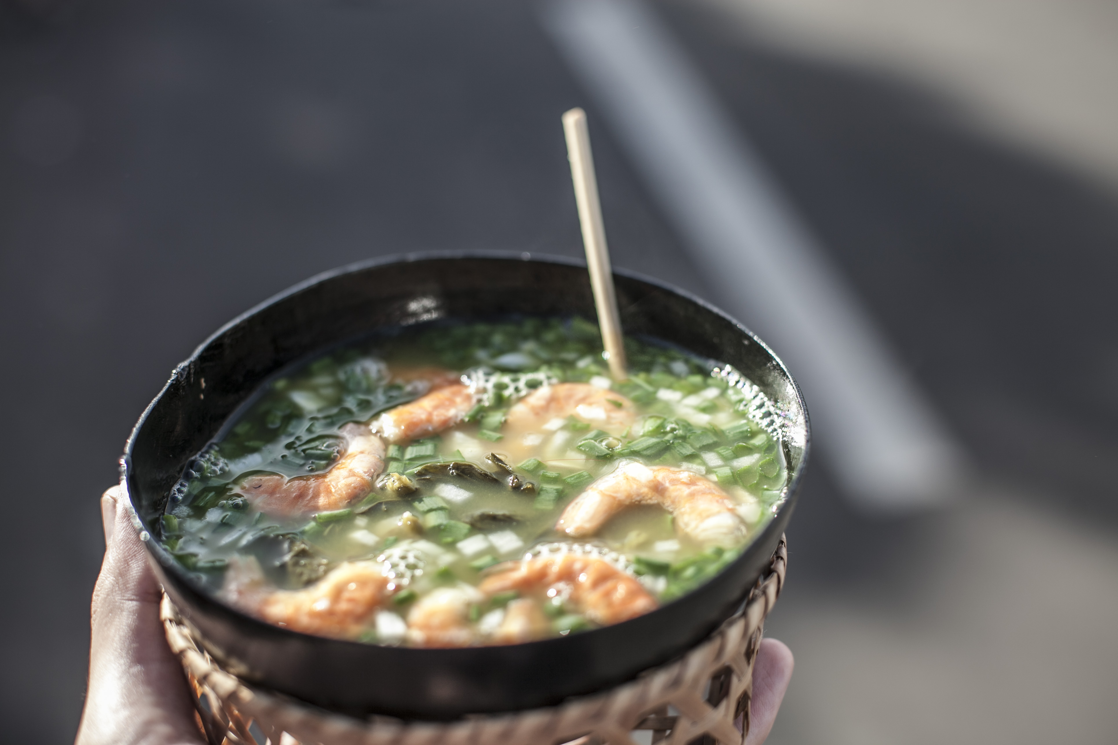 Fotos:Oliver Kornblihtt/SCDC